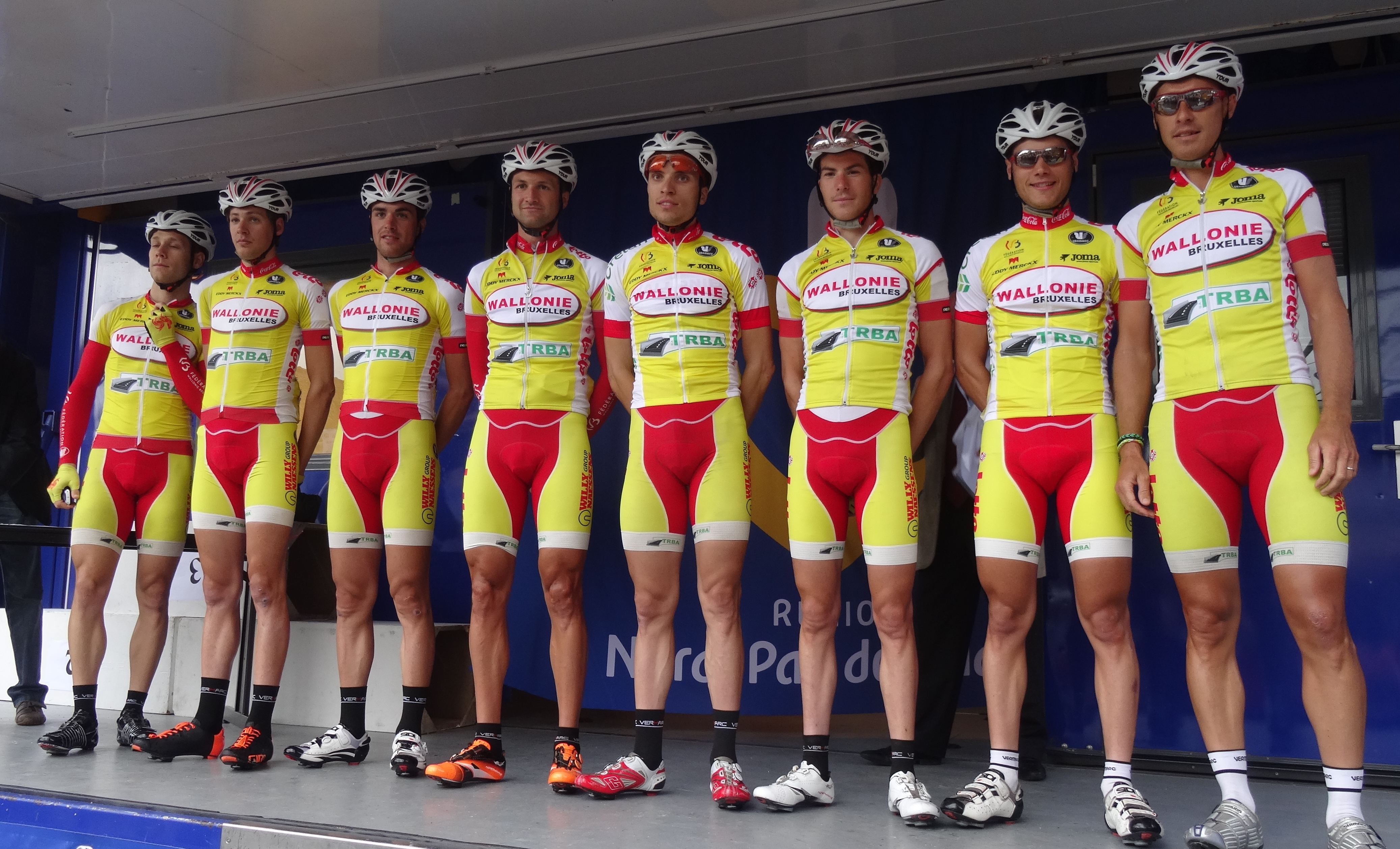 Reportage photographique réalisé le dimanche 13 juillet à l'occasion du départ et de l'arrivée de la Ronde pévéloise 2014 à Pont-à-Marcq, Nord-Pas-de-Calais, France.